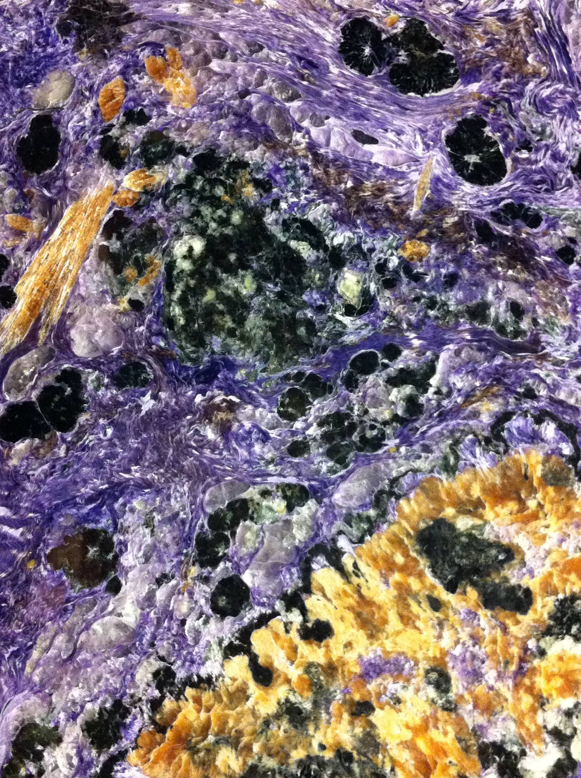 Charoit (Detail) einer polierten Platte. FO: Murunskij Massif (Jakutien, Russland) Sammlung: terra mineralia (Freiberg / Sachsen)